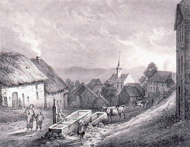 . Belmont. Bibliothèque nationale et universitaire de Strasbourg